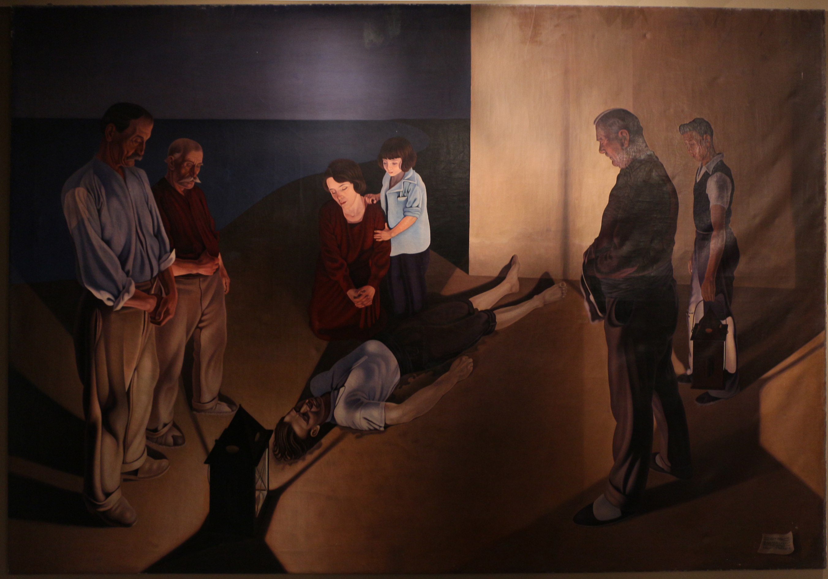 i naufraghititle QS:P1476,it:"i naufraghi" label QS:Lit,"i naufraghi"